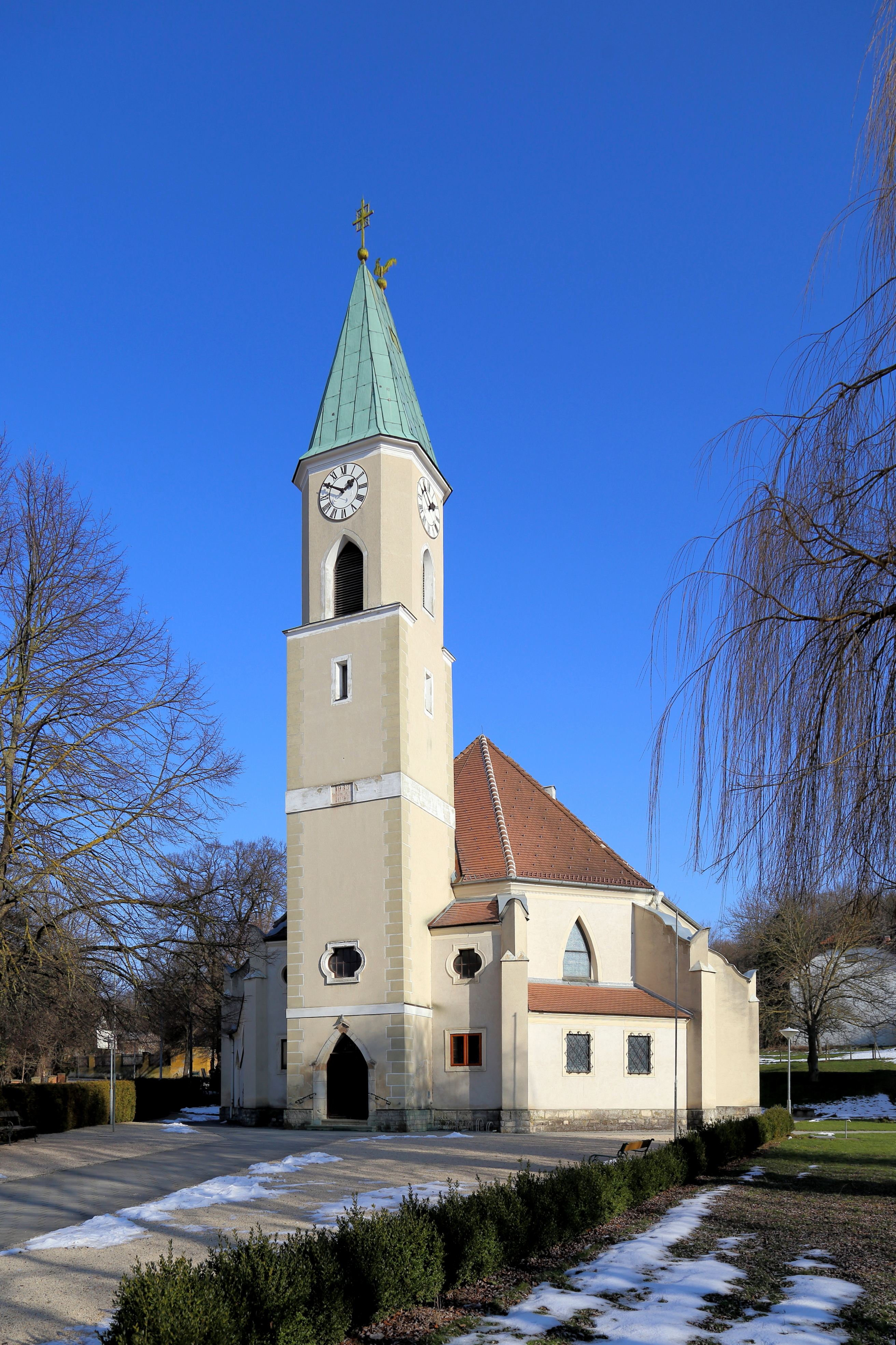 Katholische Pfarrkirche hl. Jakobus der Ältere in Niederkreuzstetten, ein Ortsteil der niederösterreichischen Marktgemeinde Kreuzstetten.